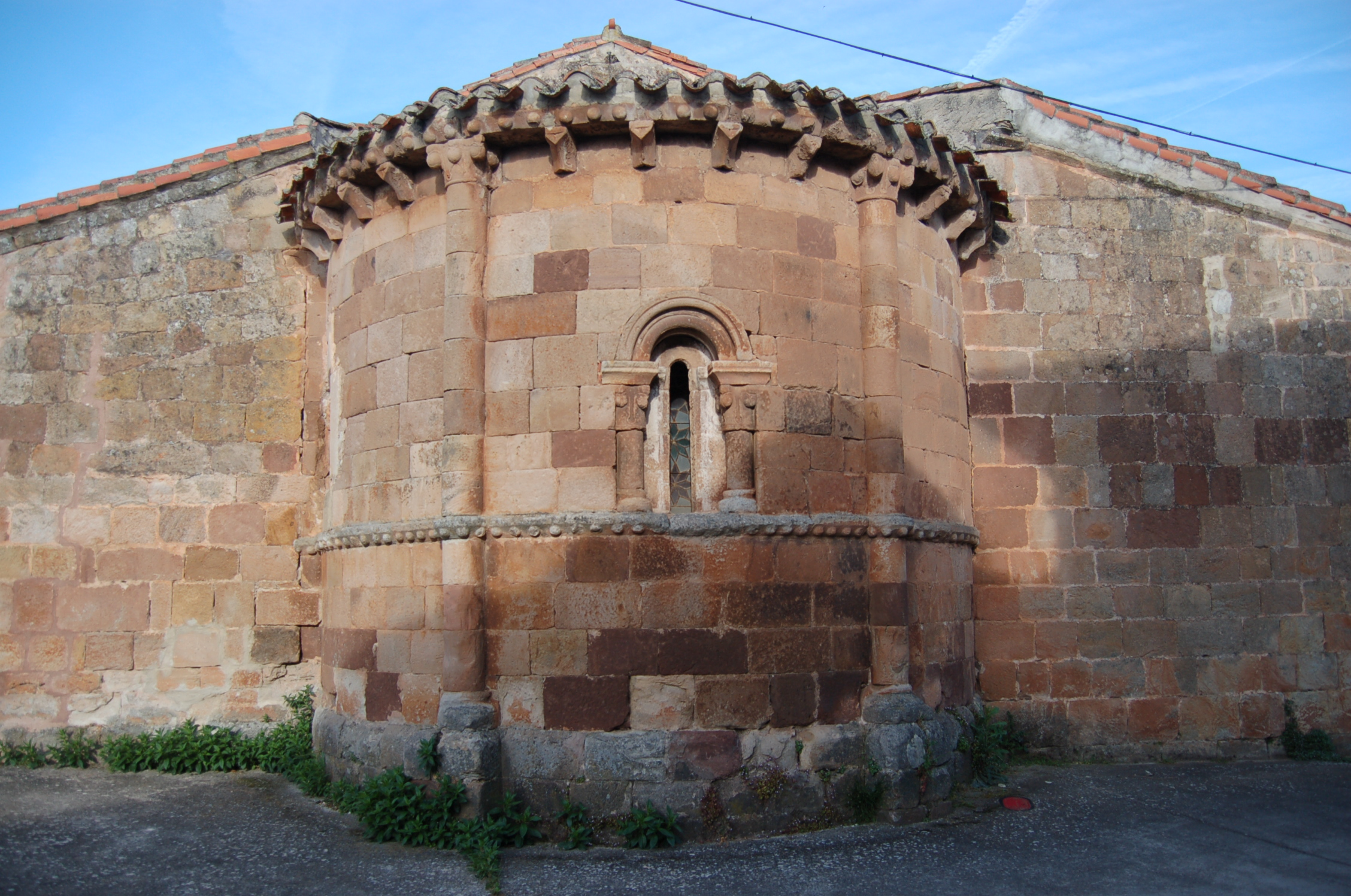 Cascajares de la Sierra